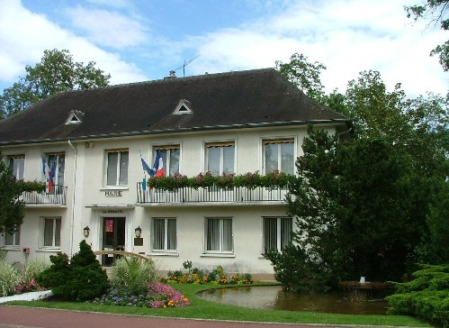 Mairie de La Rochette